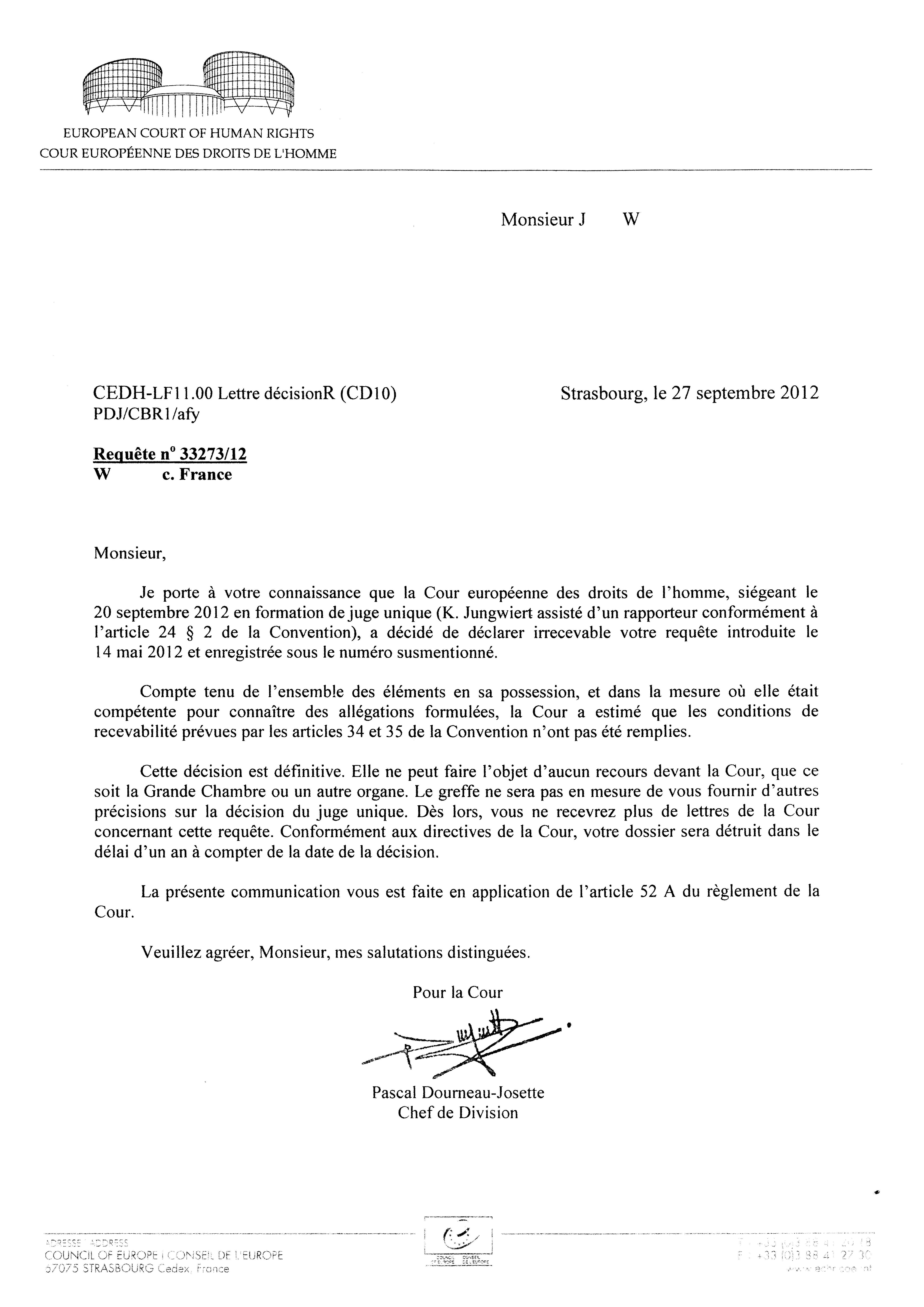 Décision de la Cour européenne des Droits de l'Homme n° 33273/12 en date du 20 septembre 2012